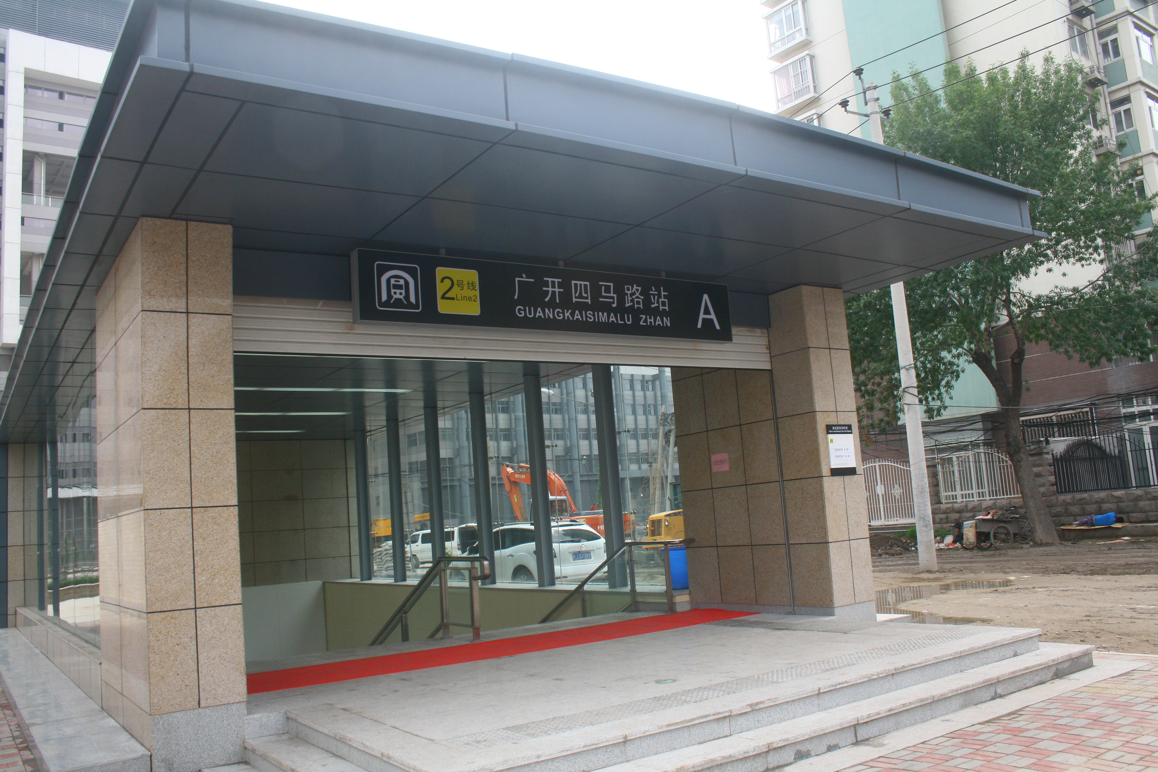 廣開四馬路站A出口